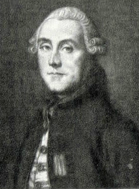 Jean-Frédéric de La Tour du Pin Gouvernet (1727-1794), gravure d'après un tableau de Jean-Baptiste Greuze